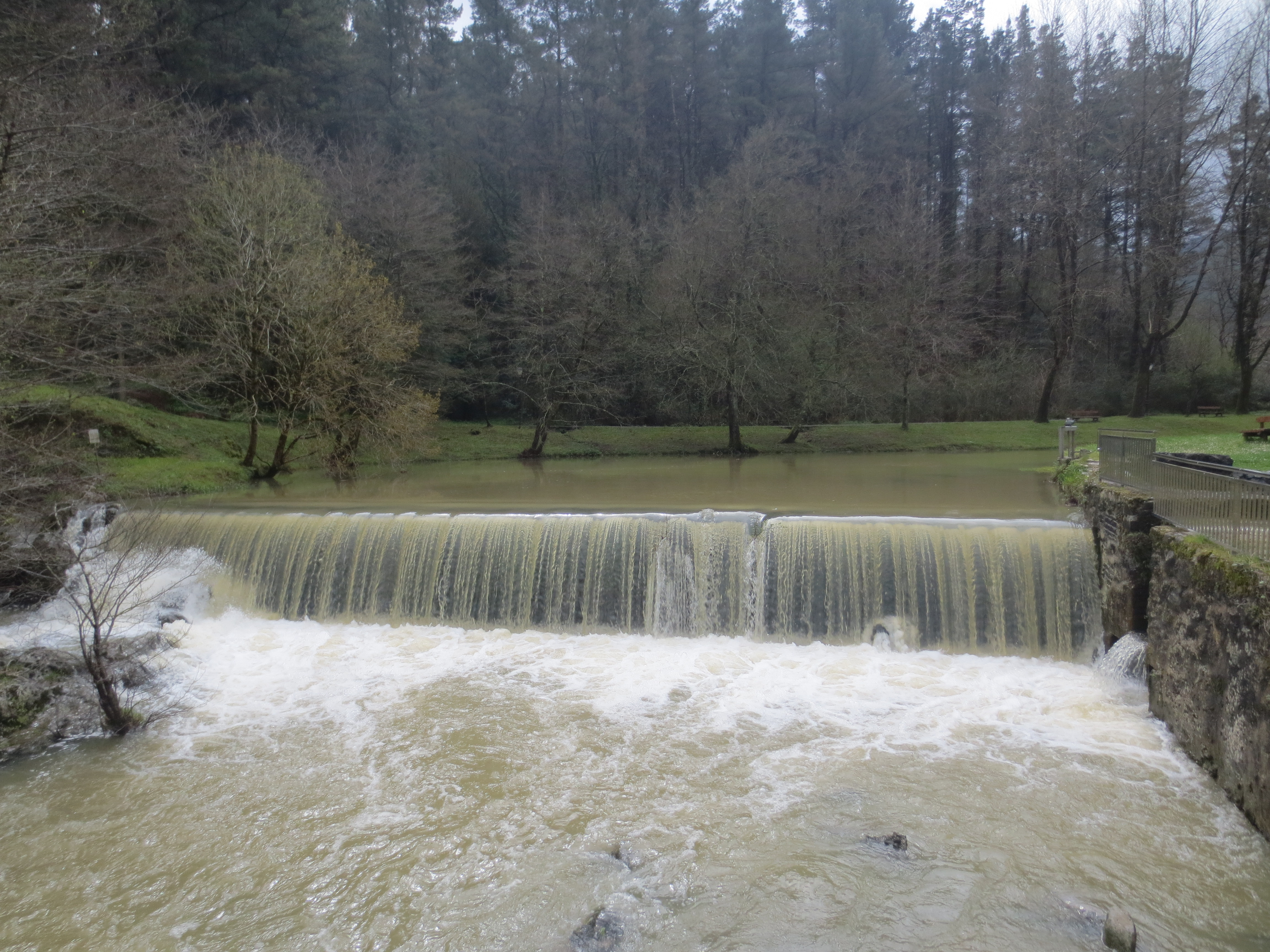 Lea ibaia. Aulesti. Desbideratze-presa.